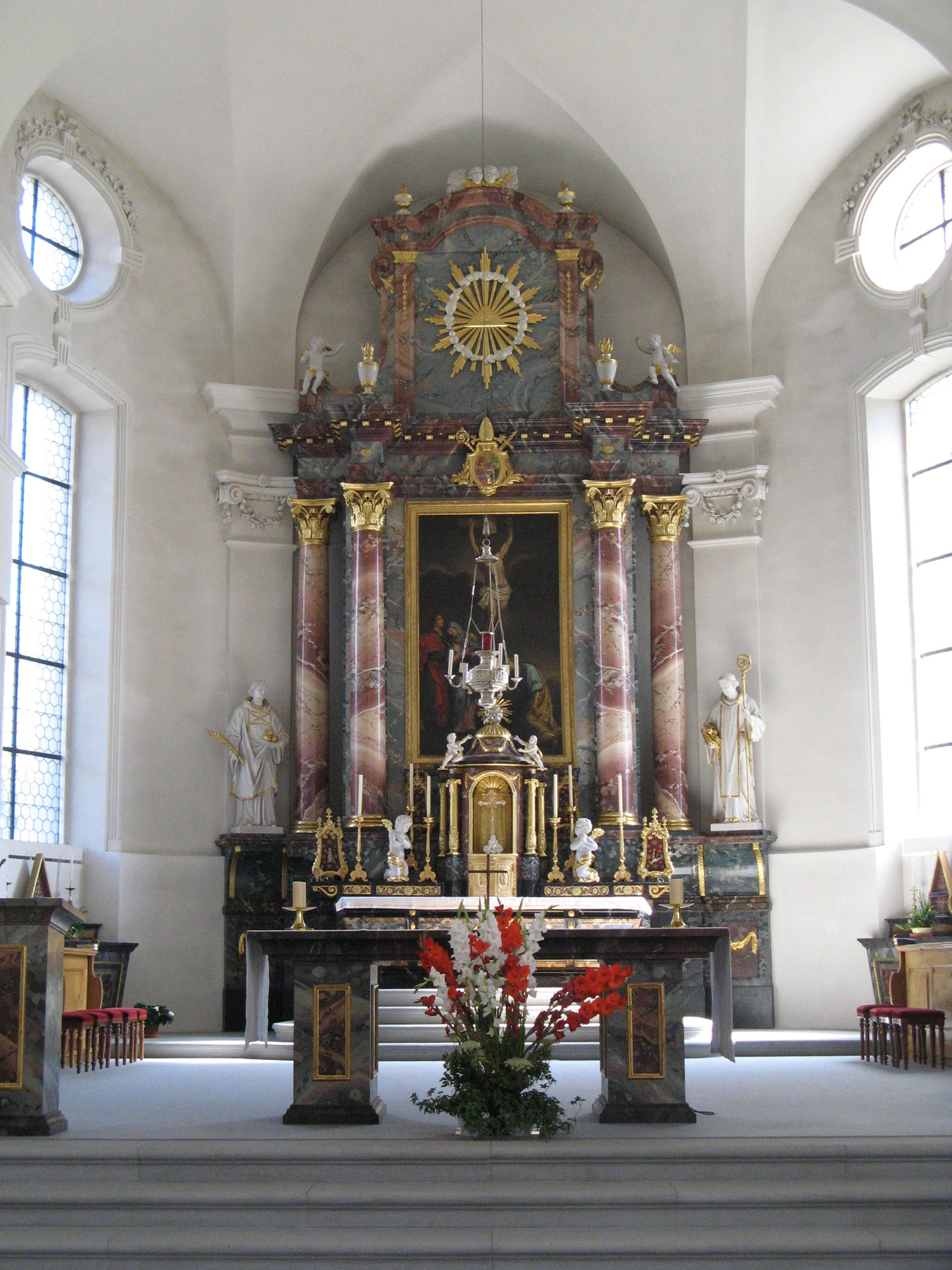 Hochaltar der Pfarrkirche St. Leonhard Wohlen